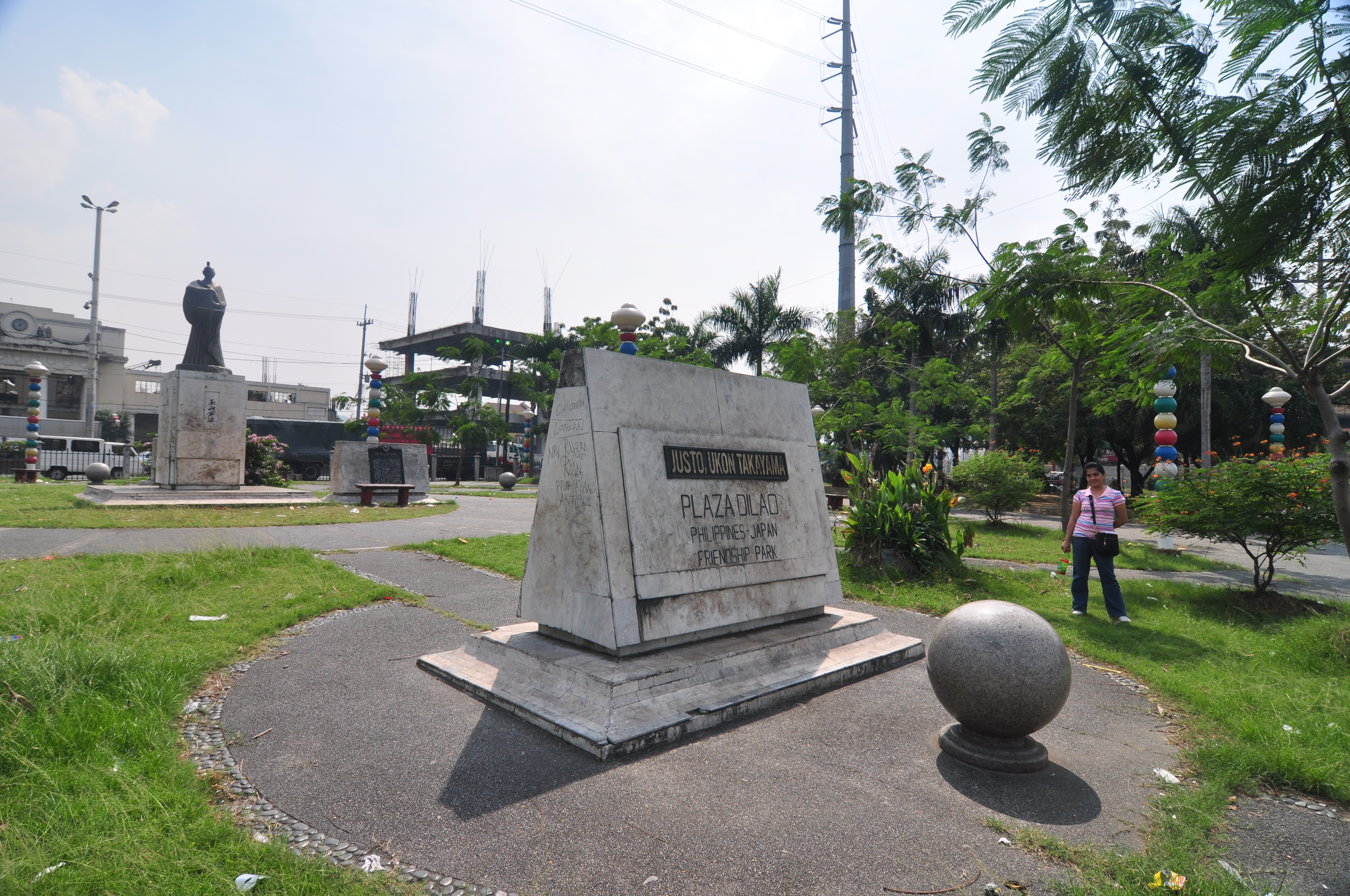 Plaza Dilao in Manila, Philippines